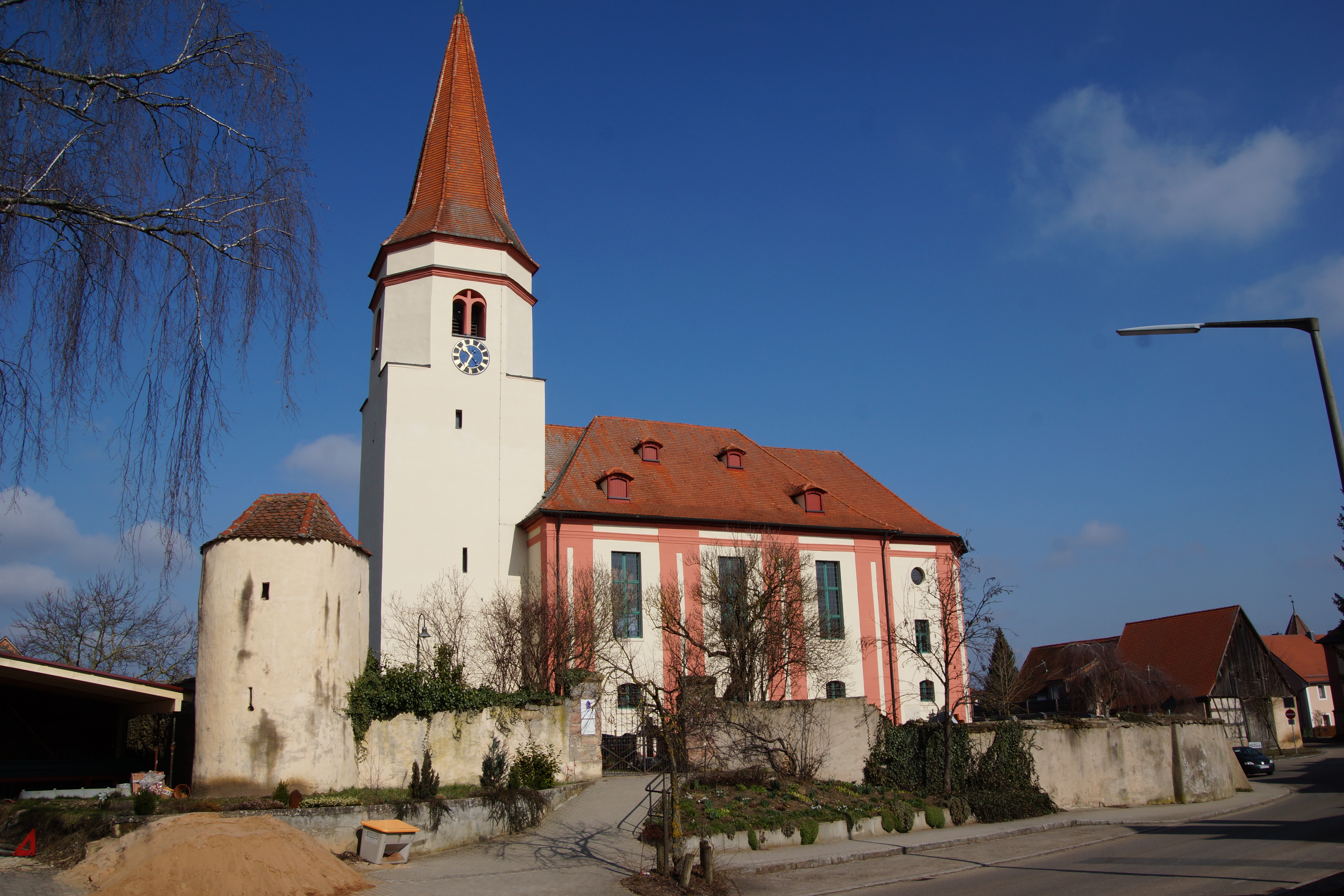 Die evangelische Pfarrkirche in Eysölden